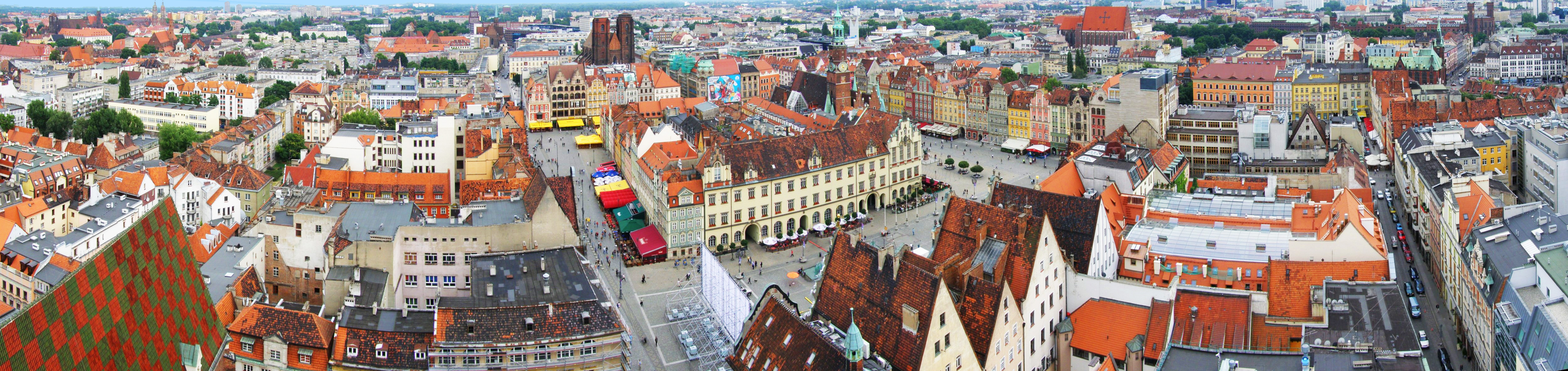 Panorama Wrocławia z wieży Św. Elżbiety